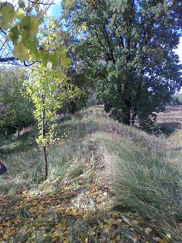 Змієвий вал біля с. Калинівка Макарівського району